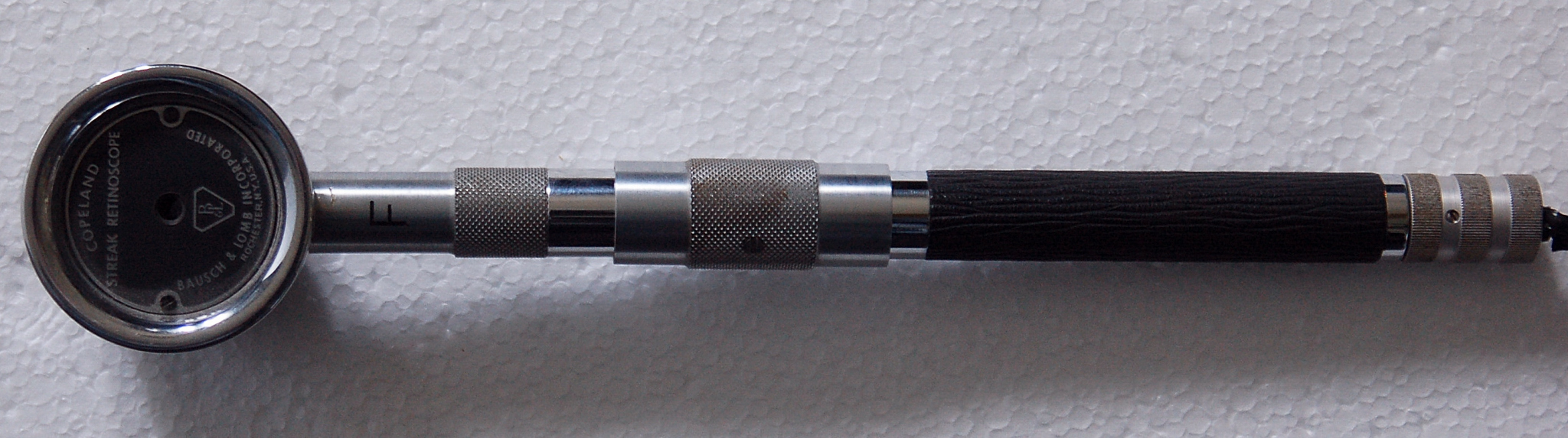 Bausch & Lomb Copeland Streak Retinoscope